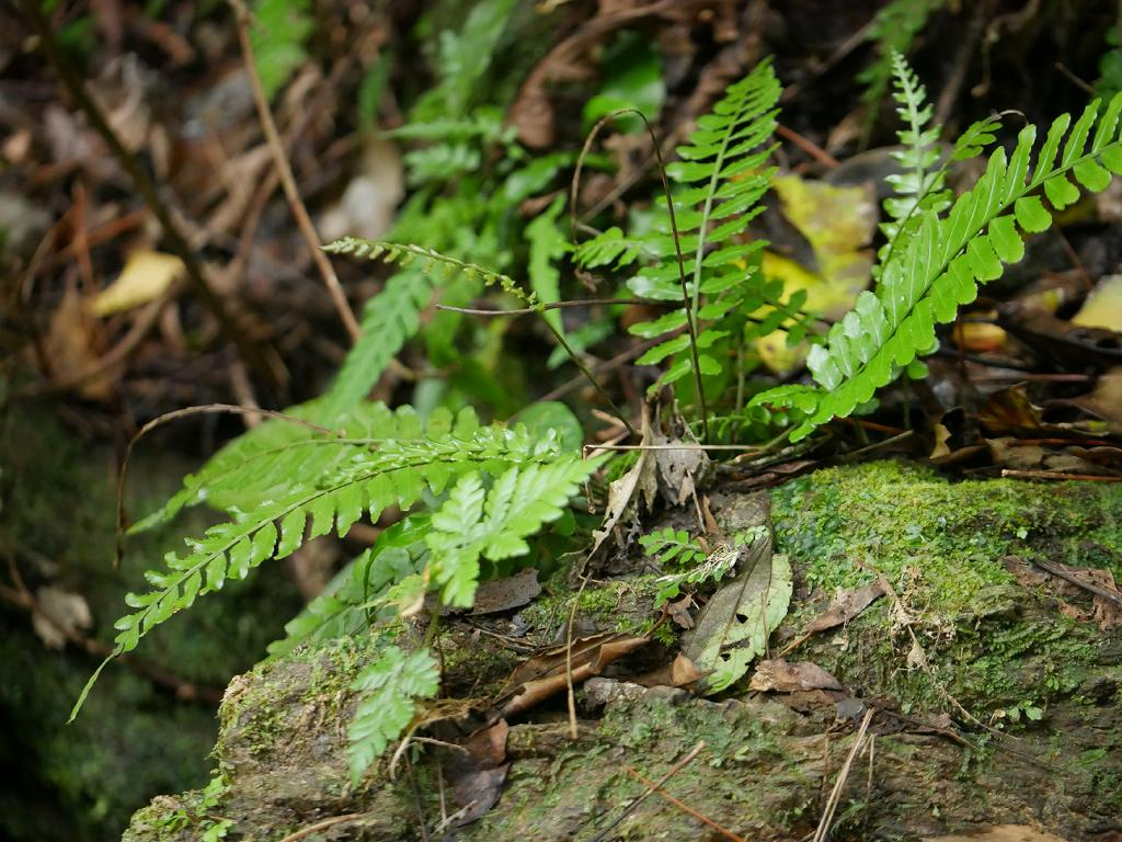 2018/12/30 沖縄本島：Okinawa Island, Japan